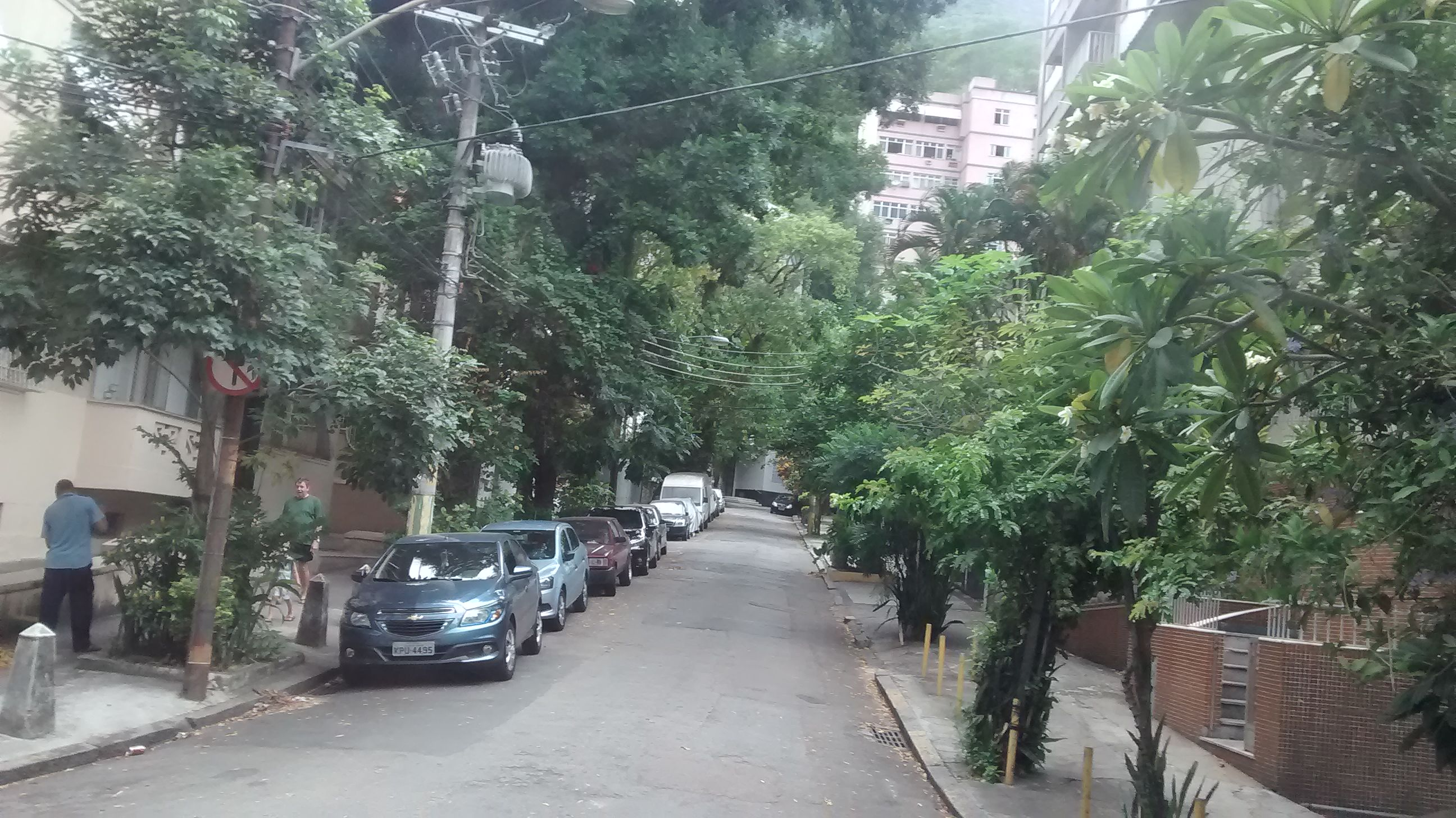 Usina, bairro localizado no Rio de Janeiro.